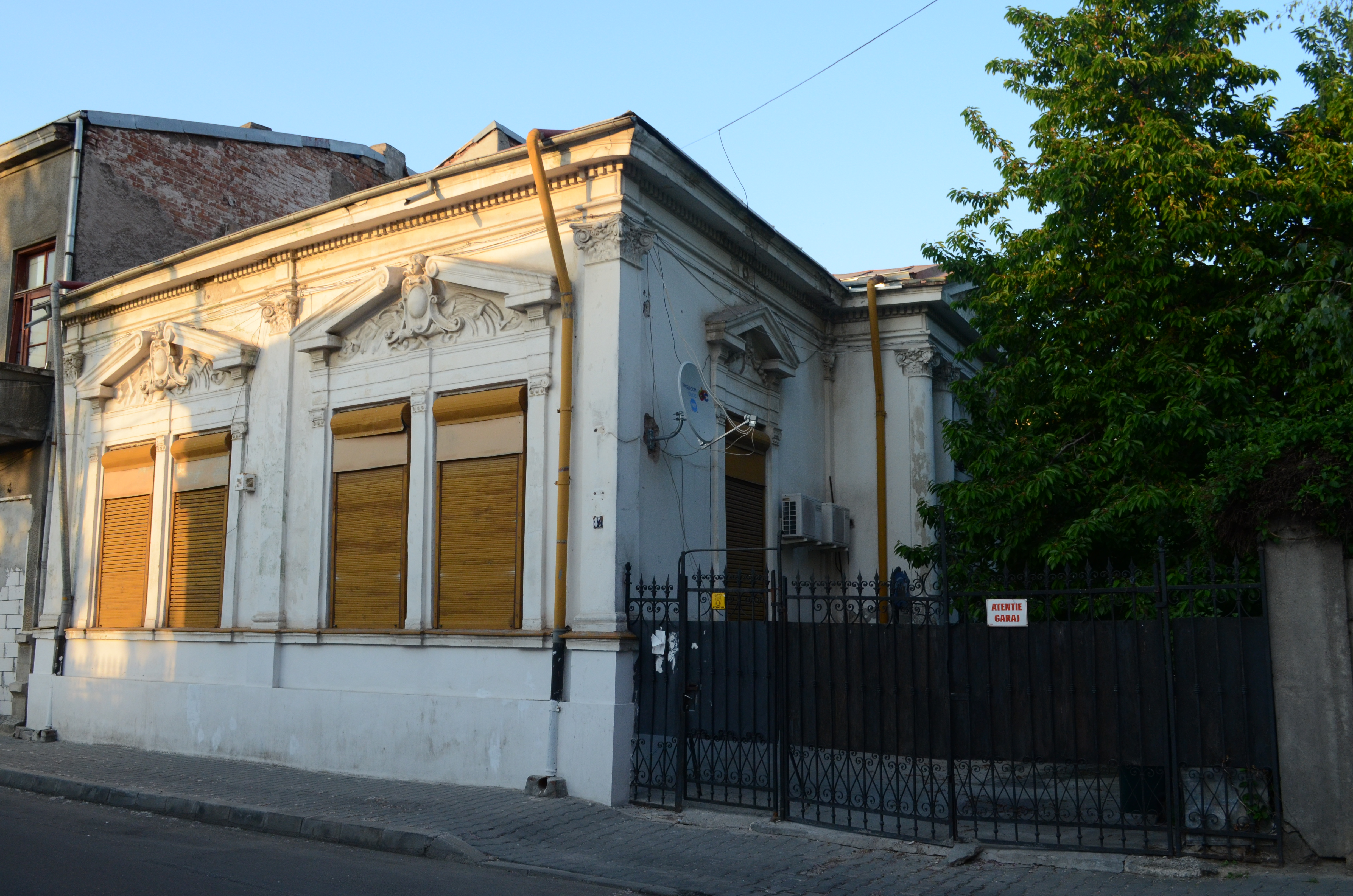 Casă, Strada Romulus nr. 87, Sector 3, București